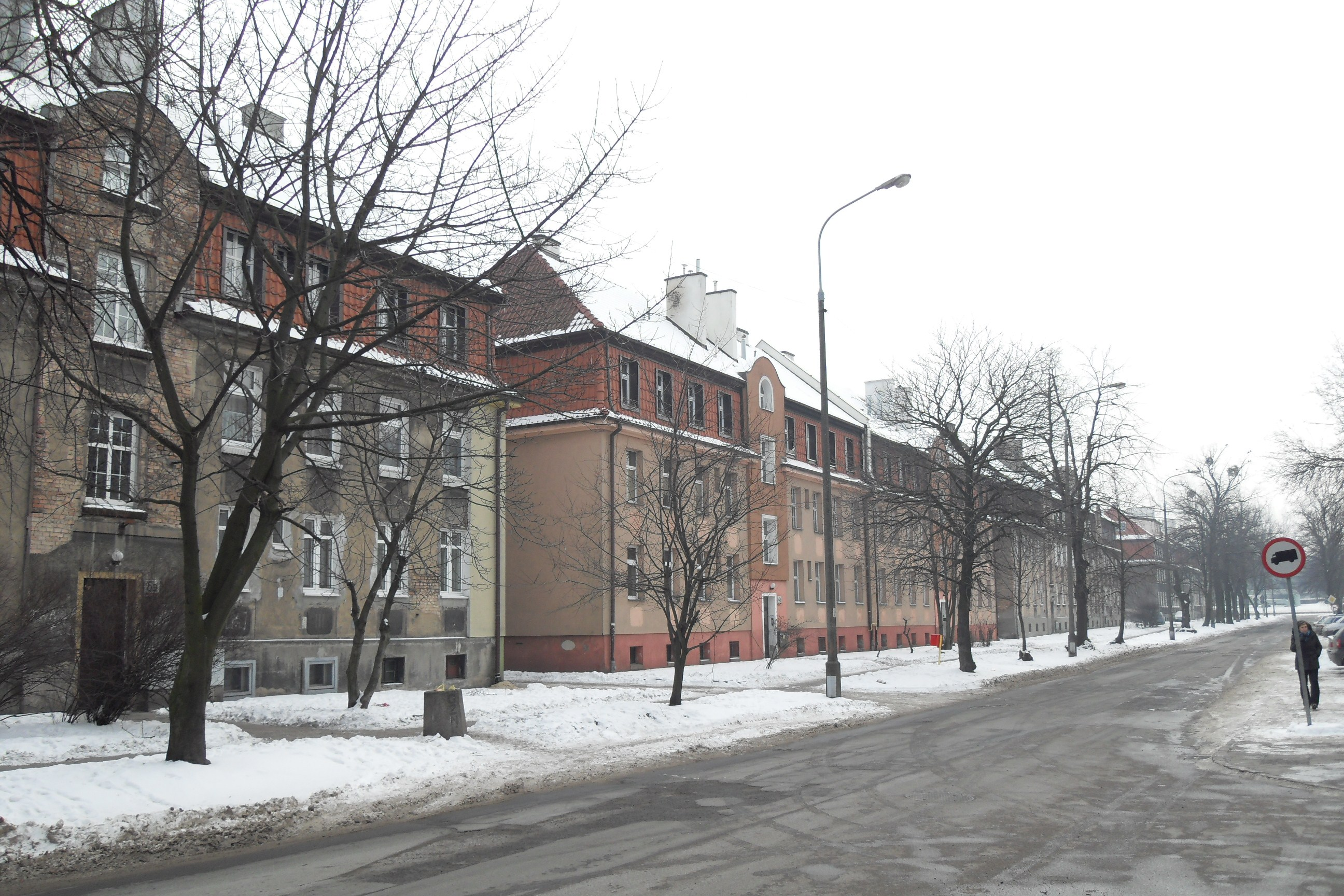 Dawne budynki mieszkalne pracowników Stoczni Schichaua (Schichau-Kolonie) w Gdańsku Młyniskach, przy ul. Twardej.